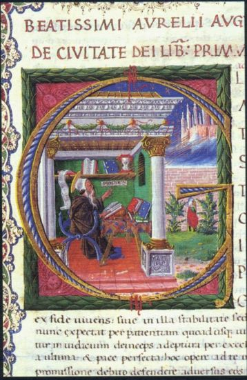 Commento al Vangelo di Giovanni di sant'Agostino, Biblioteca Malatestiana, Cesena